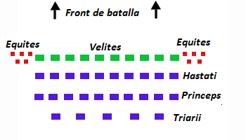 Tret de la wiki castellana